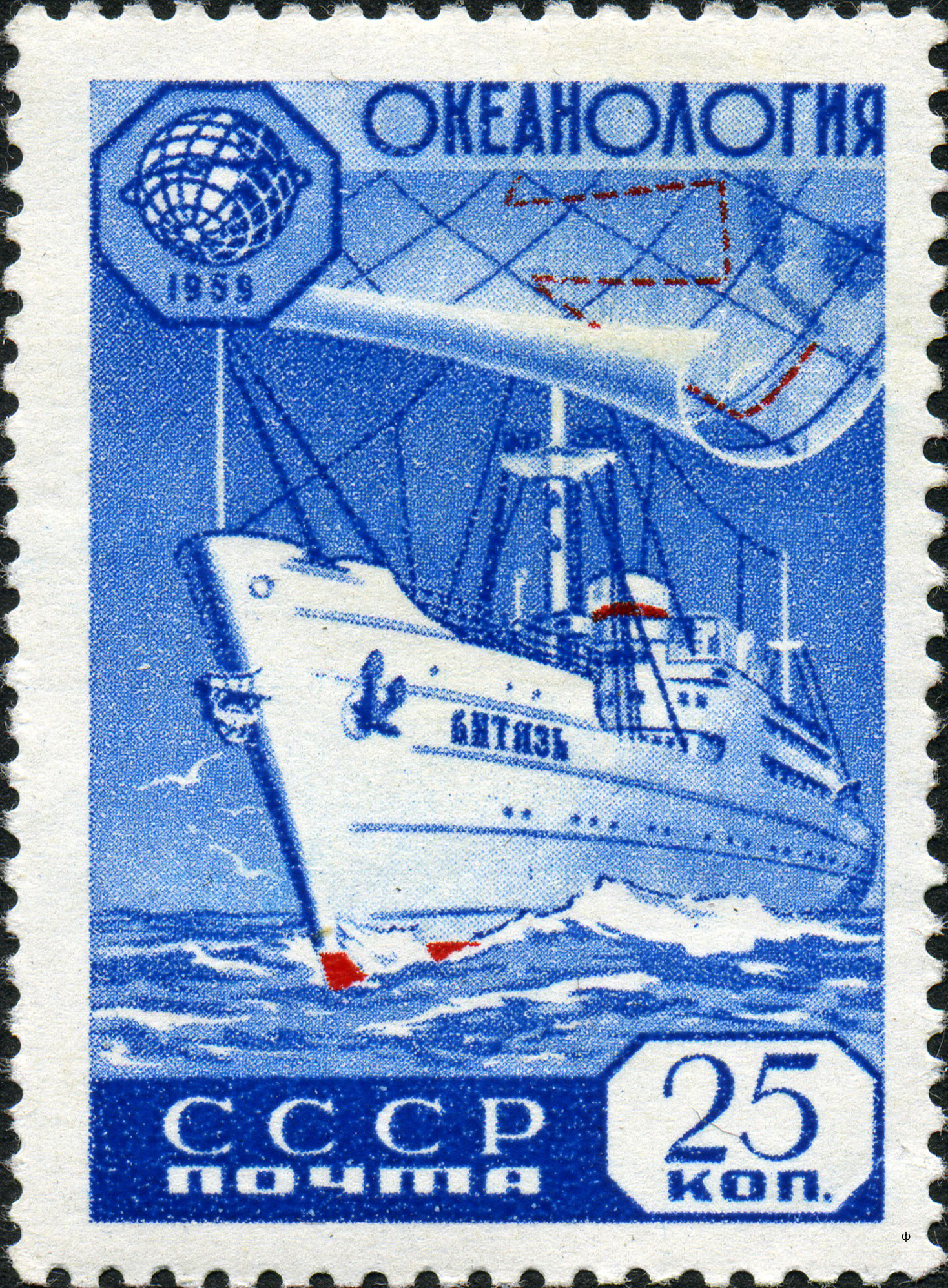 Марка СССР